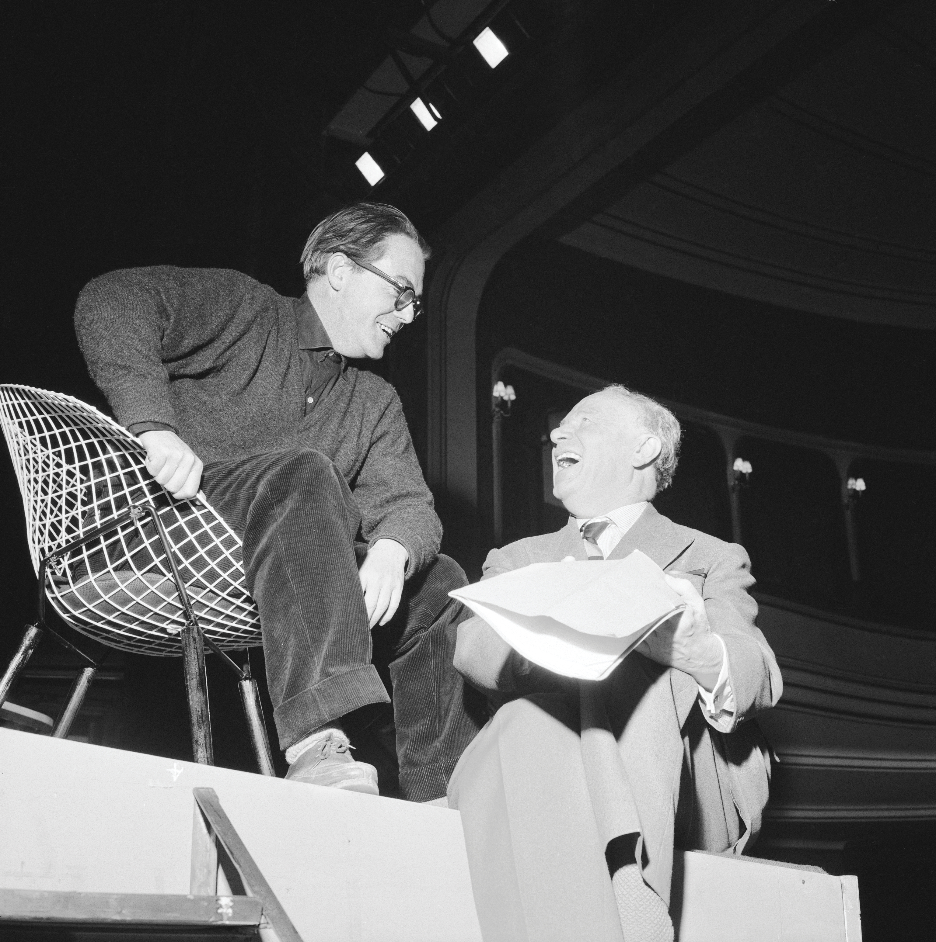 Max Frisch sitzend auf einem Metallkorbstuhl mit Oskar Wälterlin, Proben zu "Biedermann und die Brandstifter" und "Die grosse Wut des Philipp Hotz"